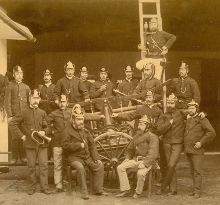 Founding Members of Freiwilligen Feuerwehr Frankenfels, Austria